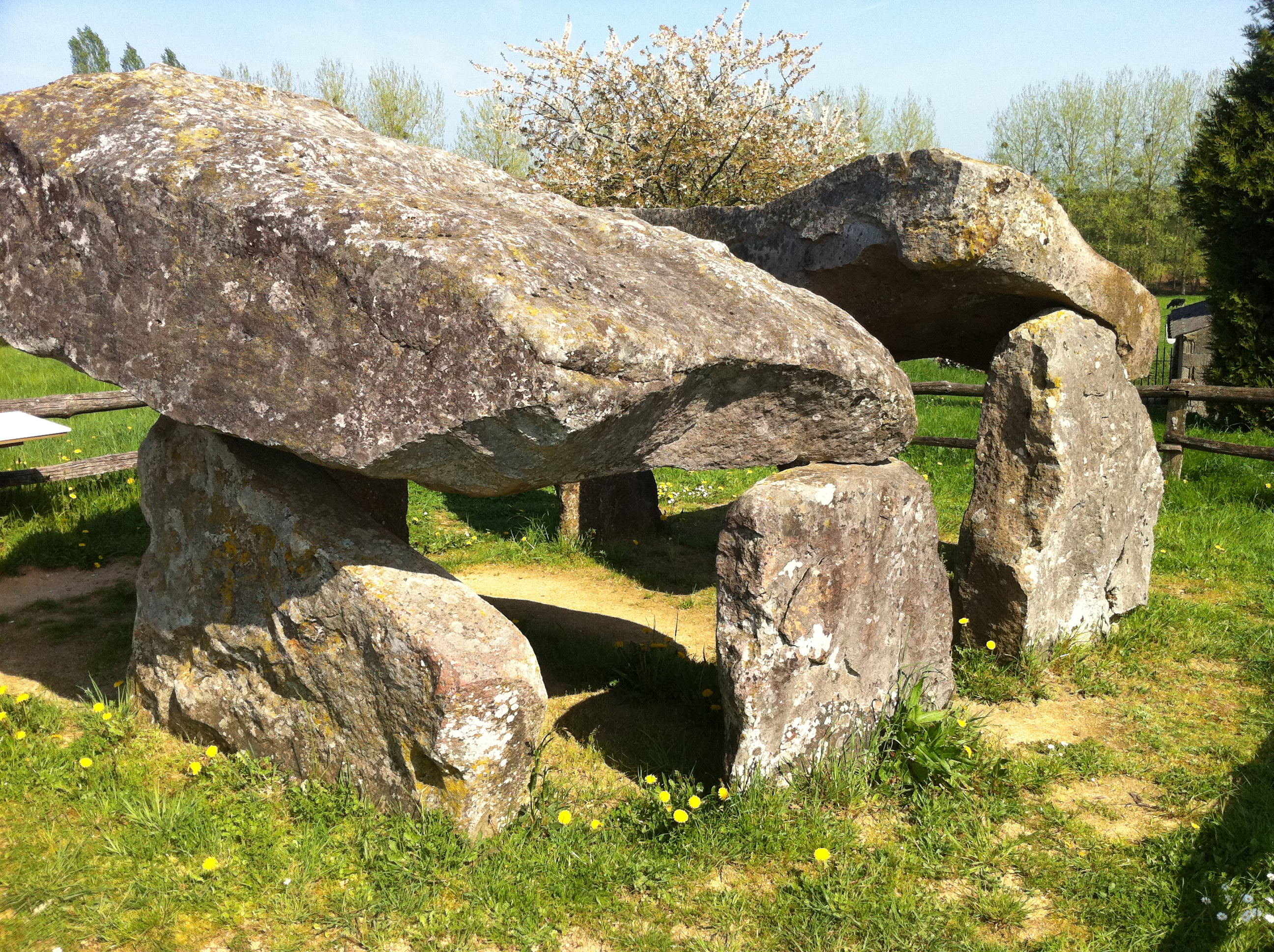 Dolmen des Erves près de Sainte-Suzanne (Mayenne)